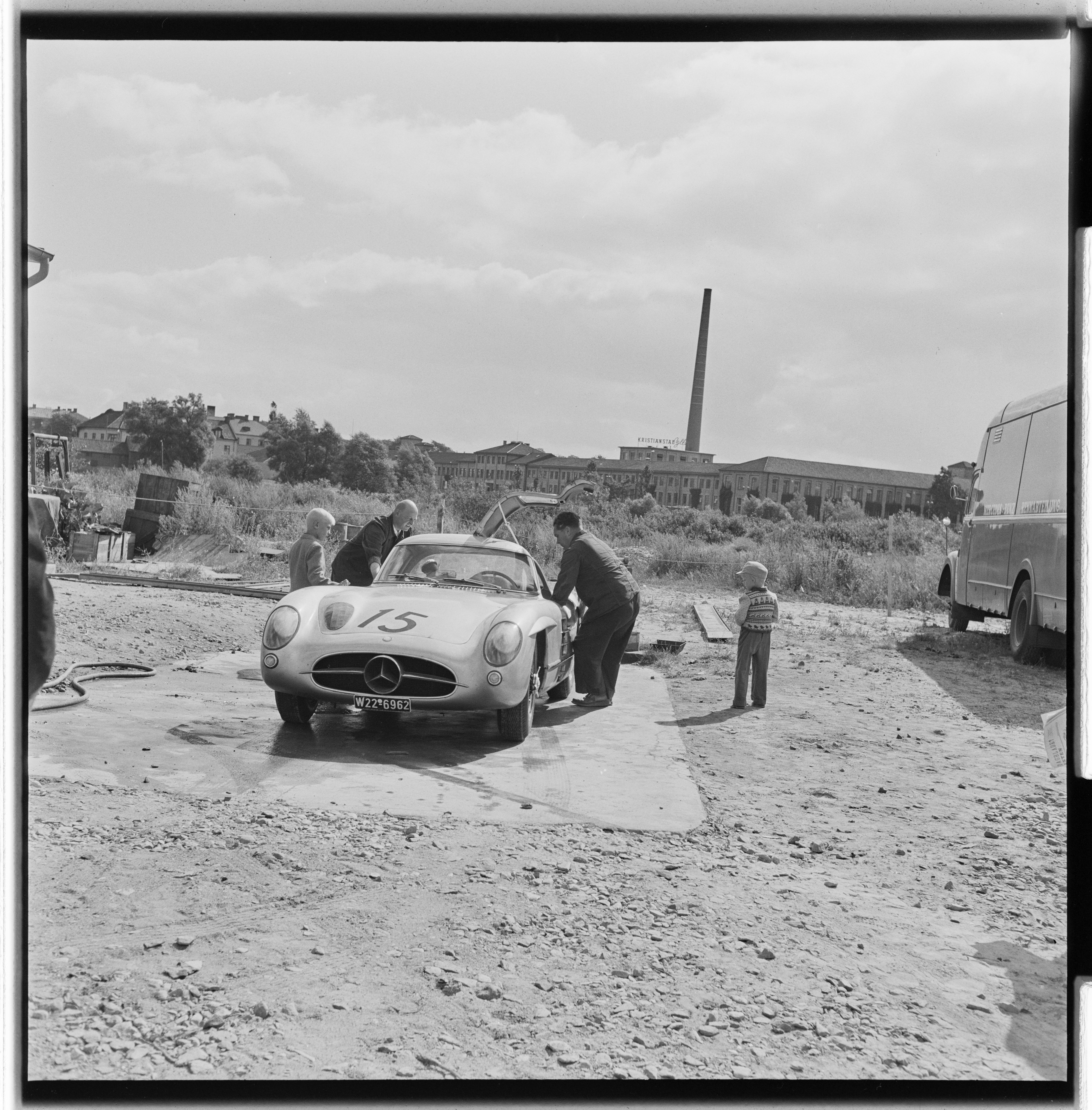 Bildet er hentet fra Arkivverket. Grand Prix i Kristianstad. NÅ nr. 33, 1955 Arkivinstitusjon : Riksarkivet Arkivnavn : Billedbladet NÅ Sted : Sverige, Skåne, Kristianstad, Råbelövsbanan Emneord: billøp, racing, motorsport Avbildet